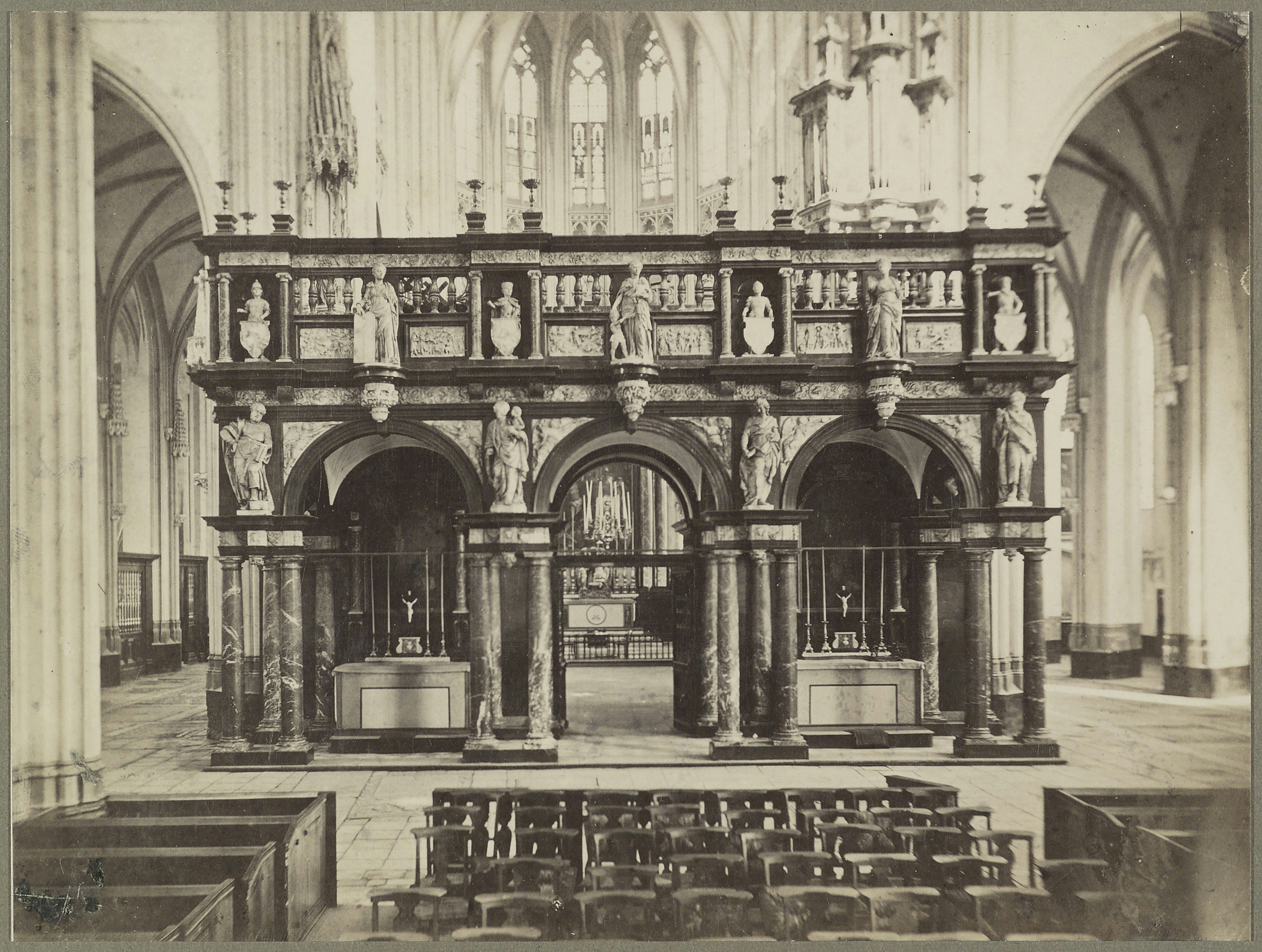 Sint Janskathedraal: Interieur: oksaal (opmerking: Fotograaf te 's Hertogenbosch)